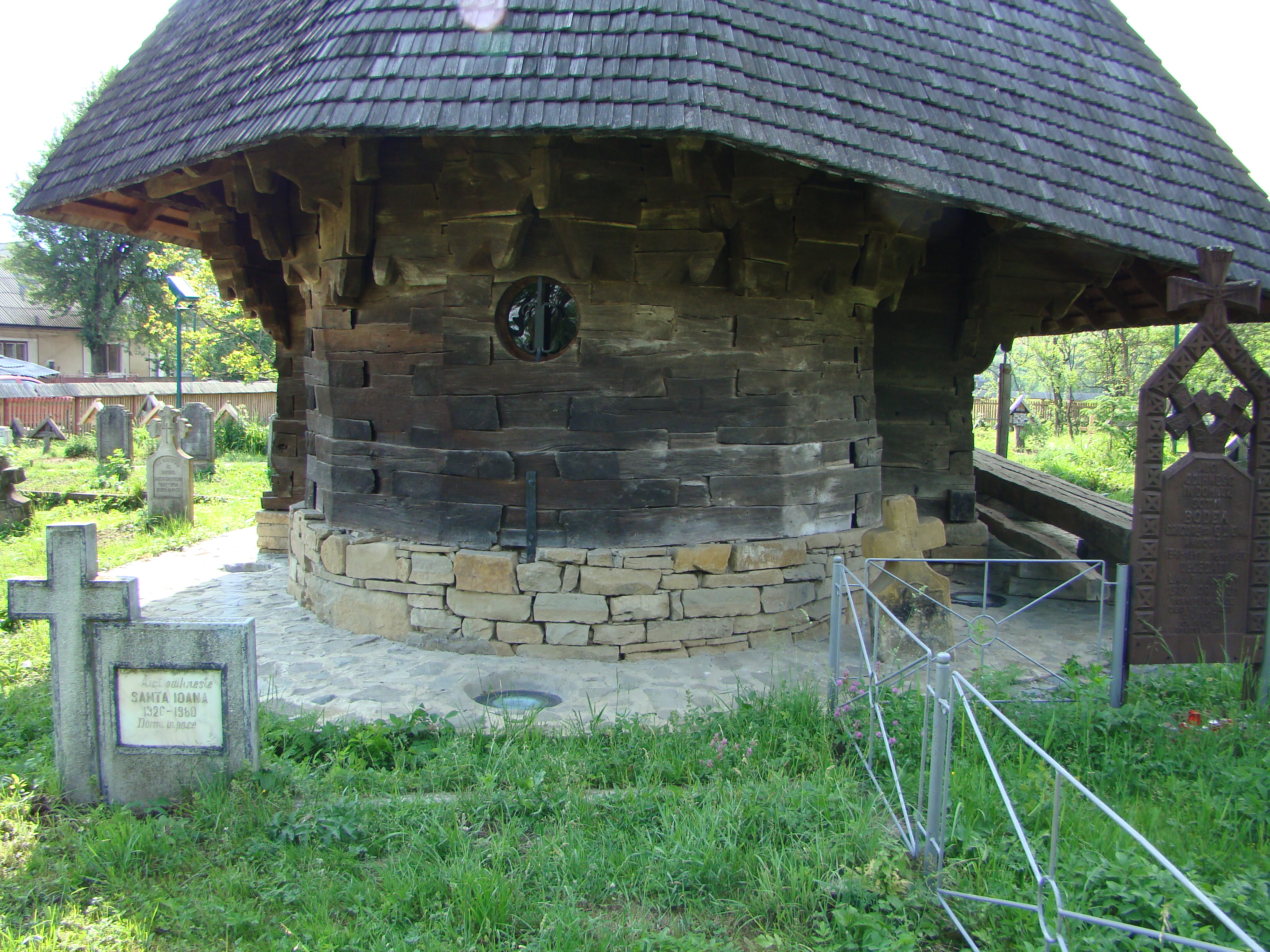 Biserica de lemn Sf.Arhangheli Rogoz